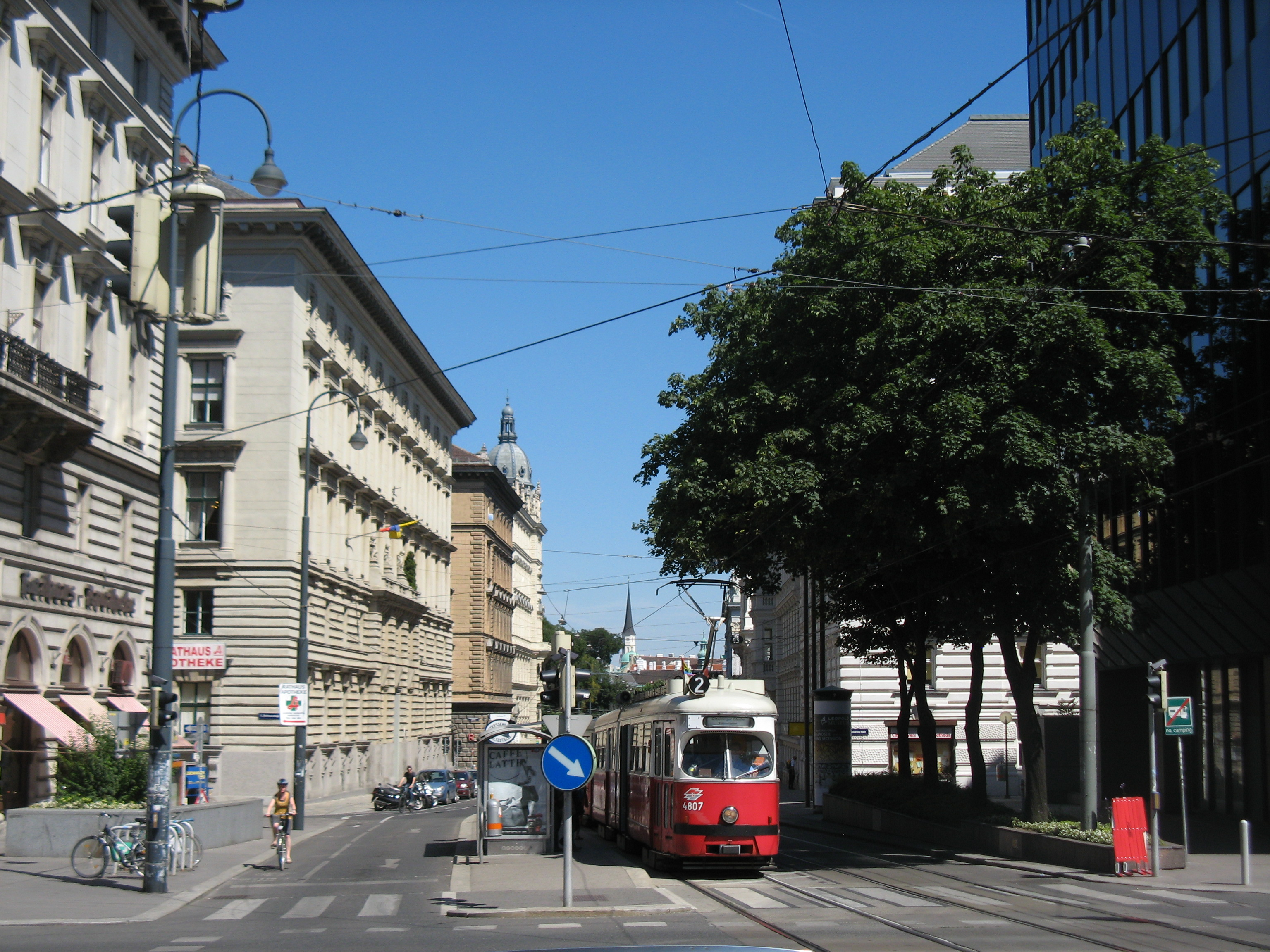 Blick in die Stadiongasse mit Straßenbahn Linie 2, von der Landesgerichtsstraße aus gesehen, Wien-Innere Stadt